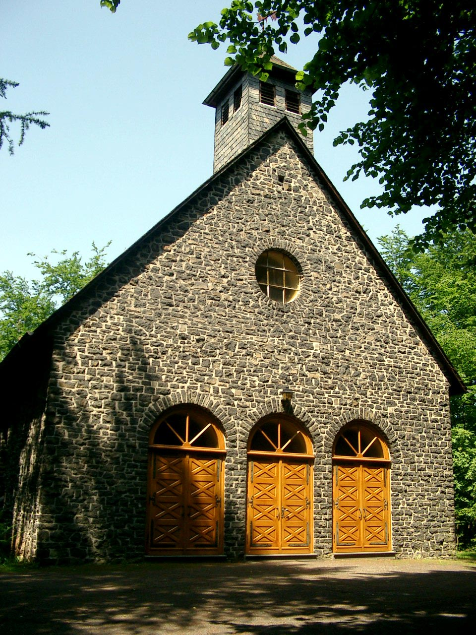 Muttergottes-Kapelle in Guckheim/Mother of God Chapel in Guckheim